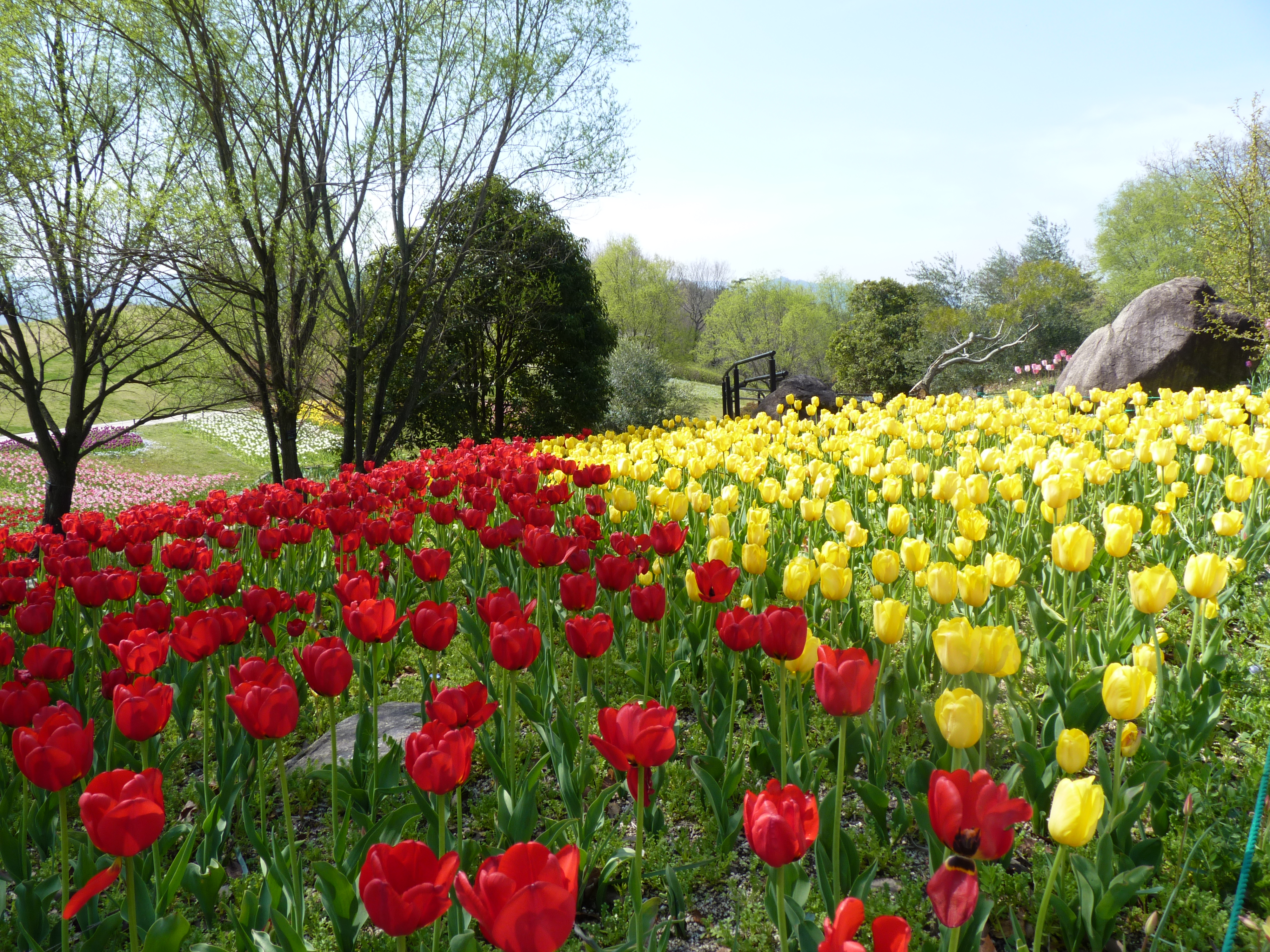 tulip garden